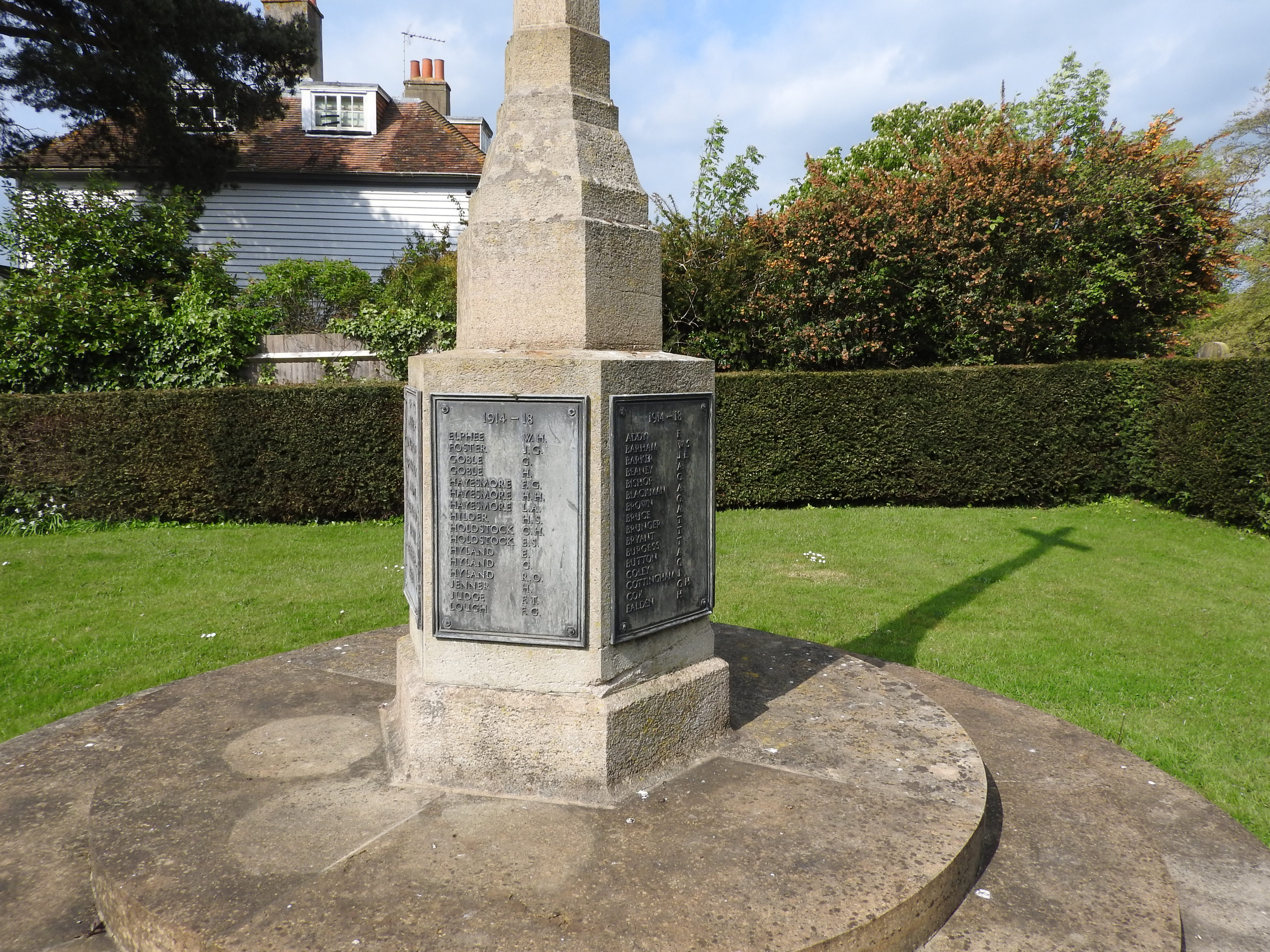 Rolvenden war memorial, Rolvenden, Kent.